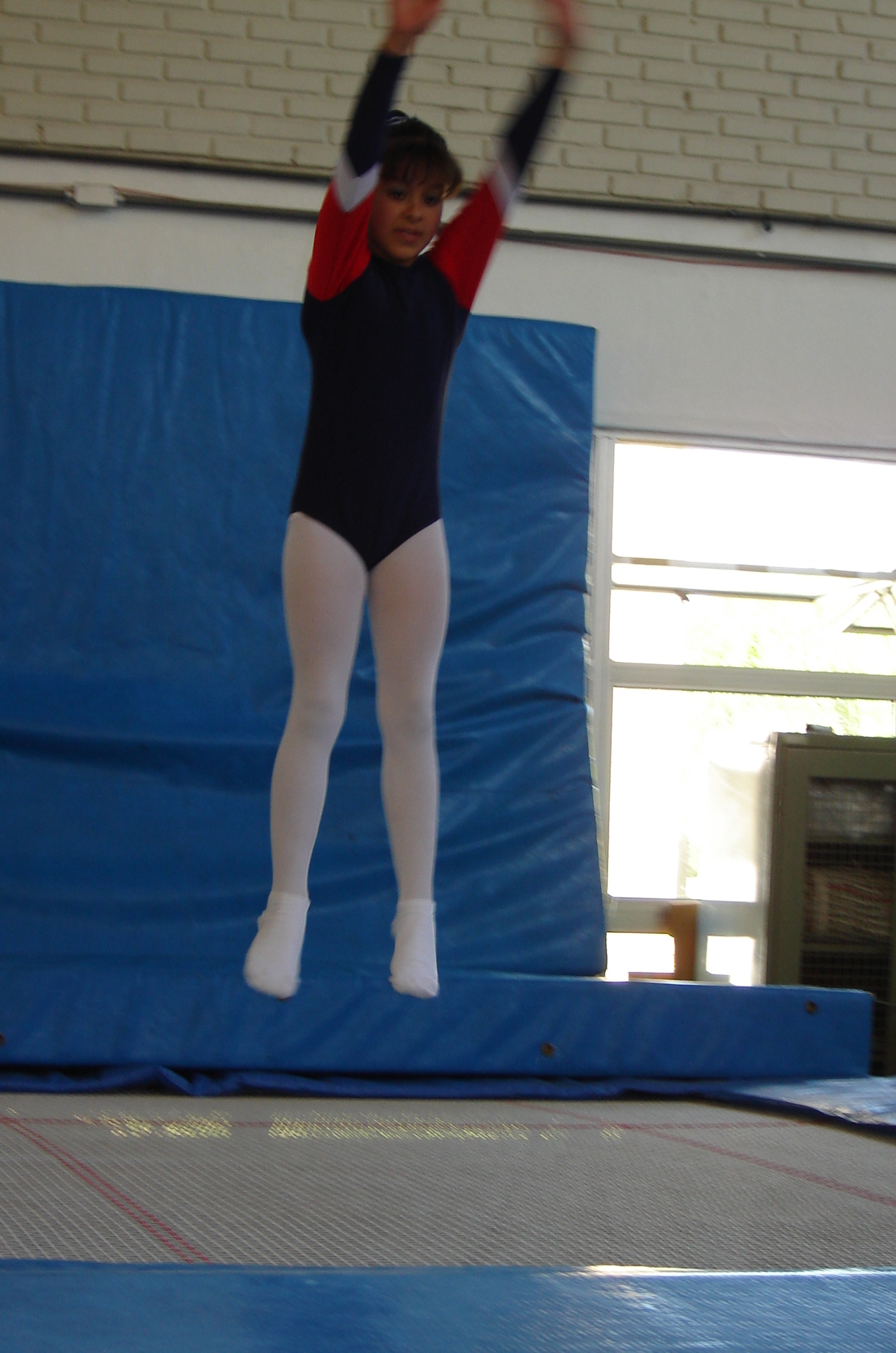 Foto da minha vizinha feita por meus pais.